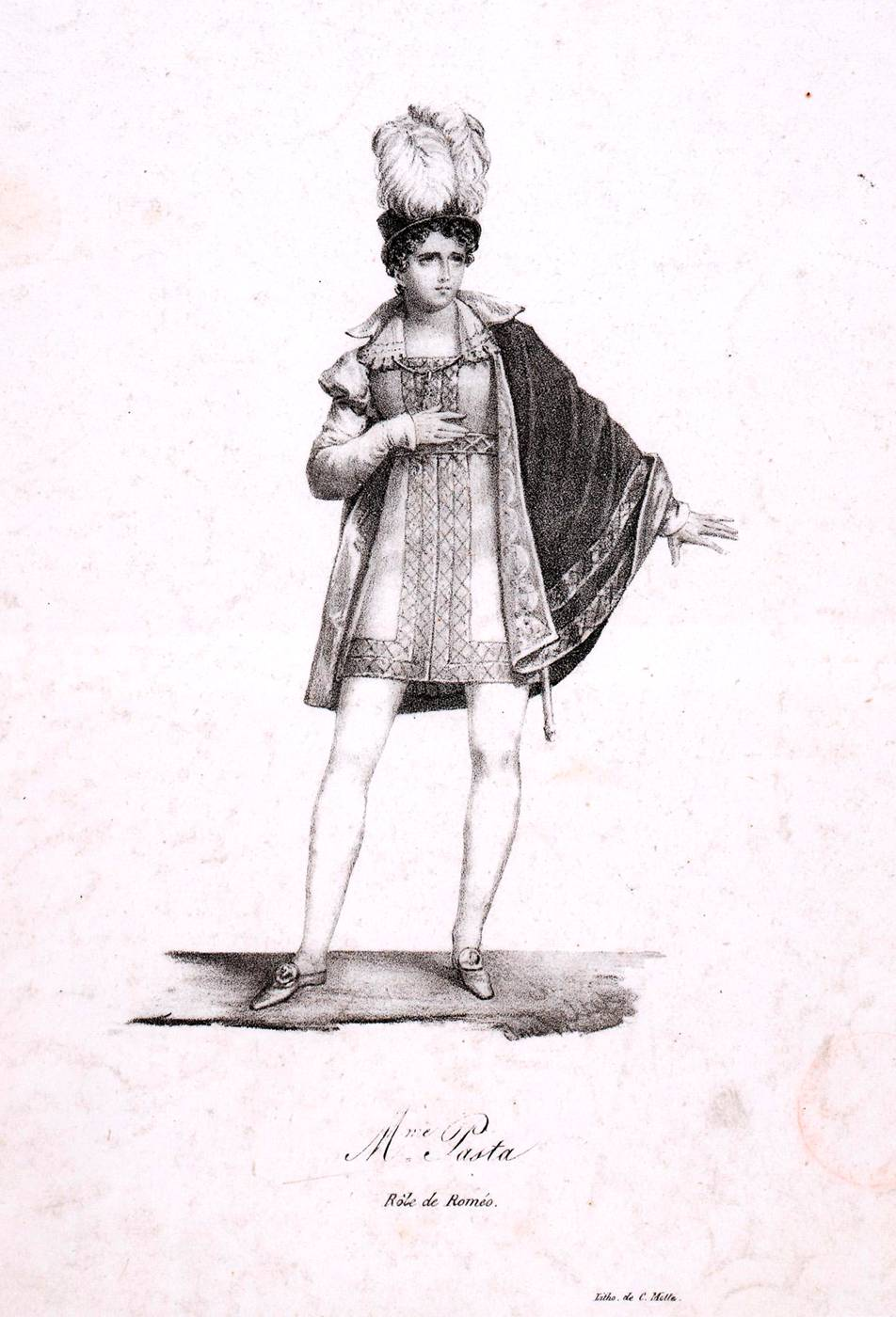 Giuditta Pasta dans le rôle de Roméo de Romeo e Giuletta de Zingarelli, Théâtre-Italien, Paris 1821